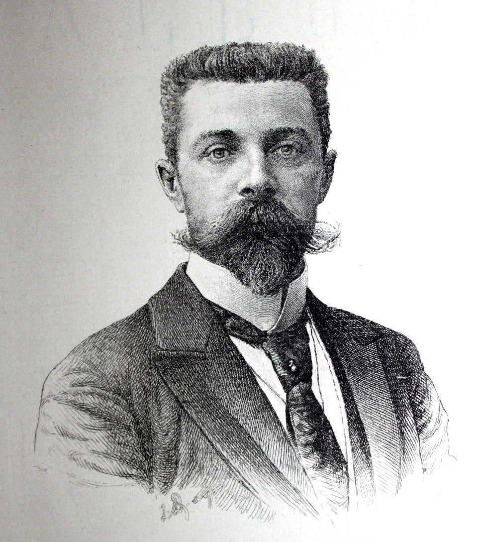 French painter André Brouillet (1857-1914)